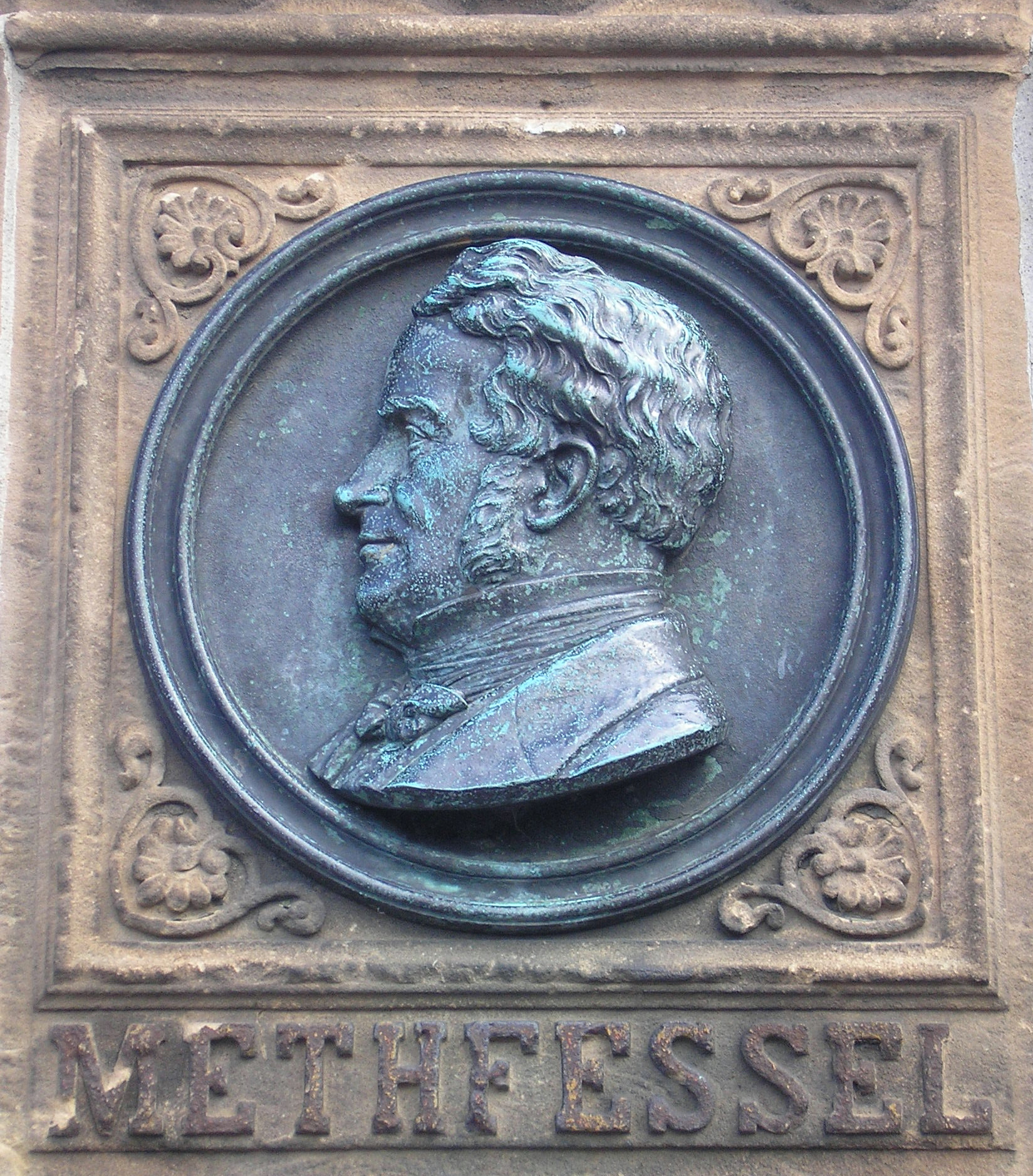 Portrait von Methfessel am Obelisk auf dem Stadtilmer Marktplatz.